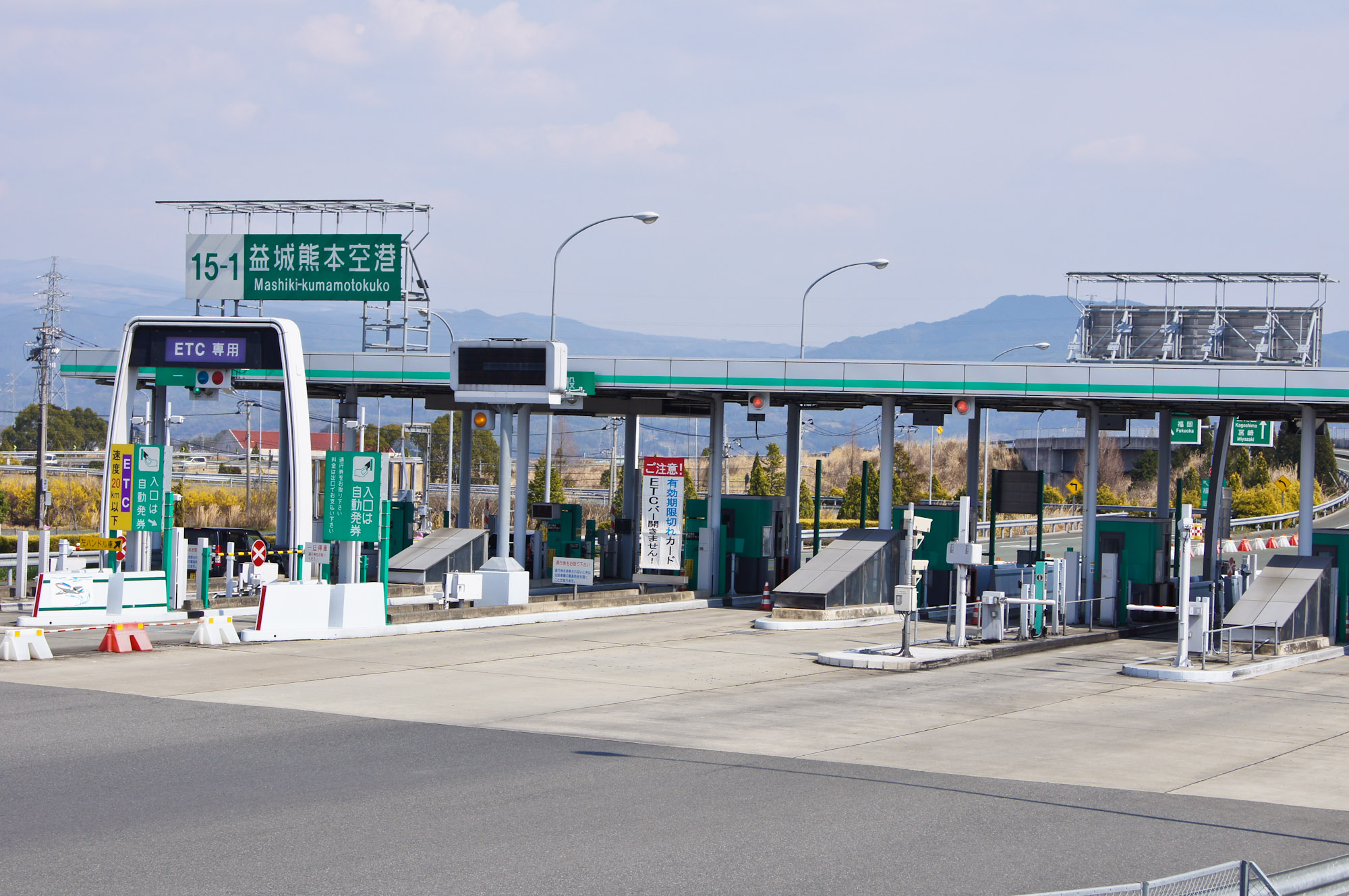 益城熊本空港インターチェンジ